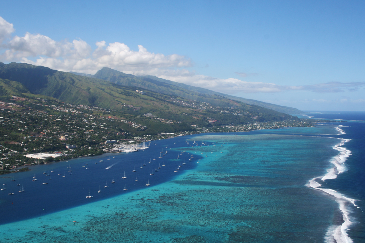 Lagon de Papeete